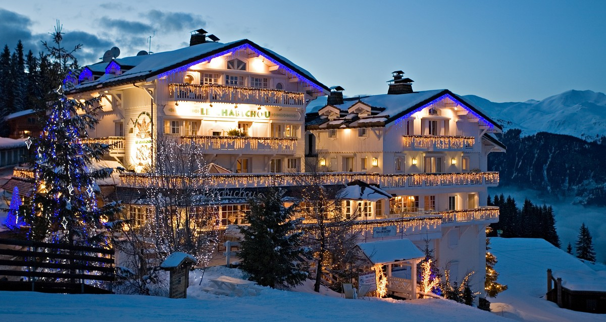 Hôtel Le Chabichou, Courchevel 1850, France